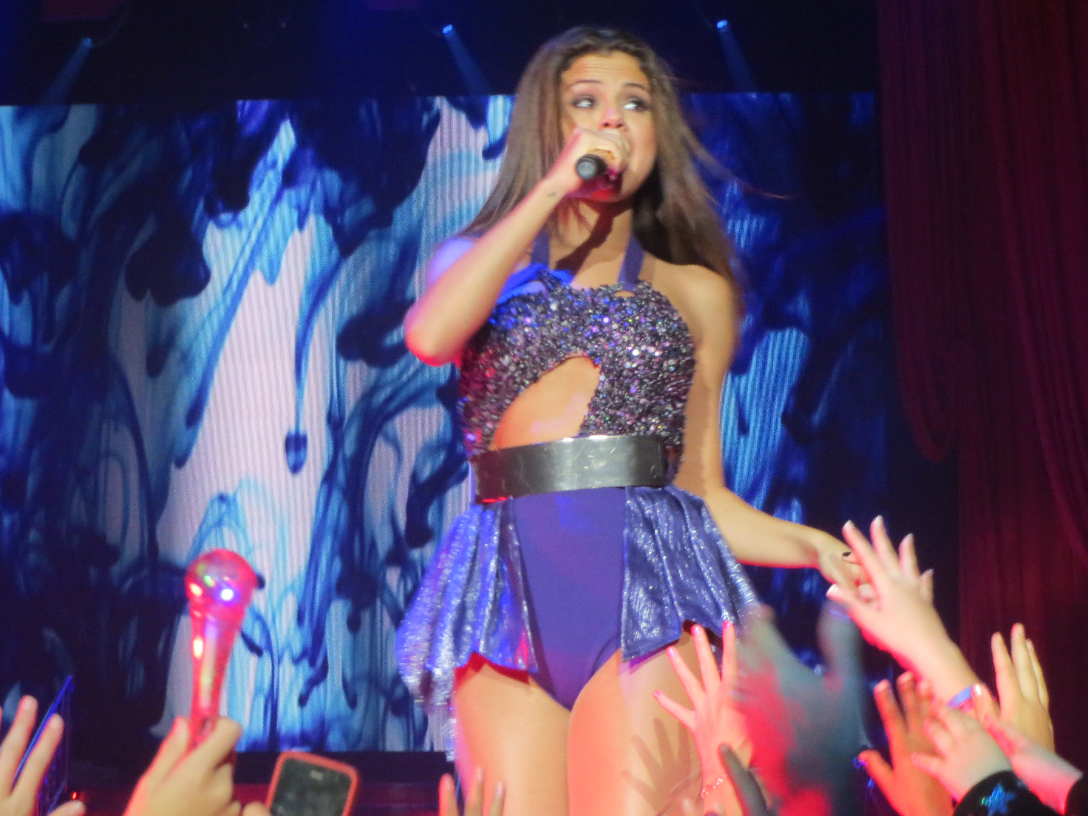 Selena Gomez StarsDance Nov 2013 San Diego, CA